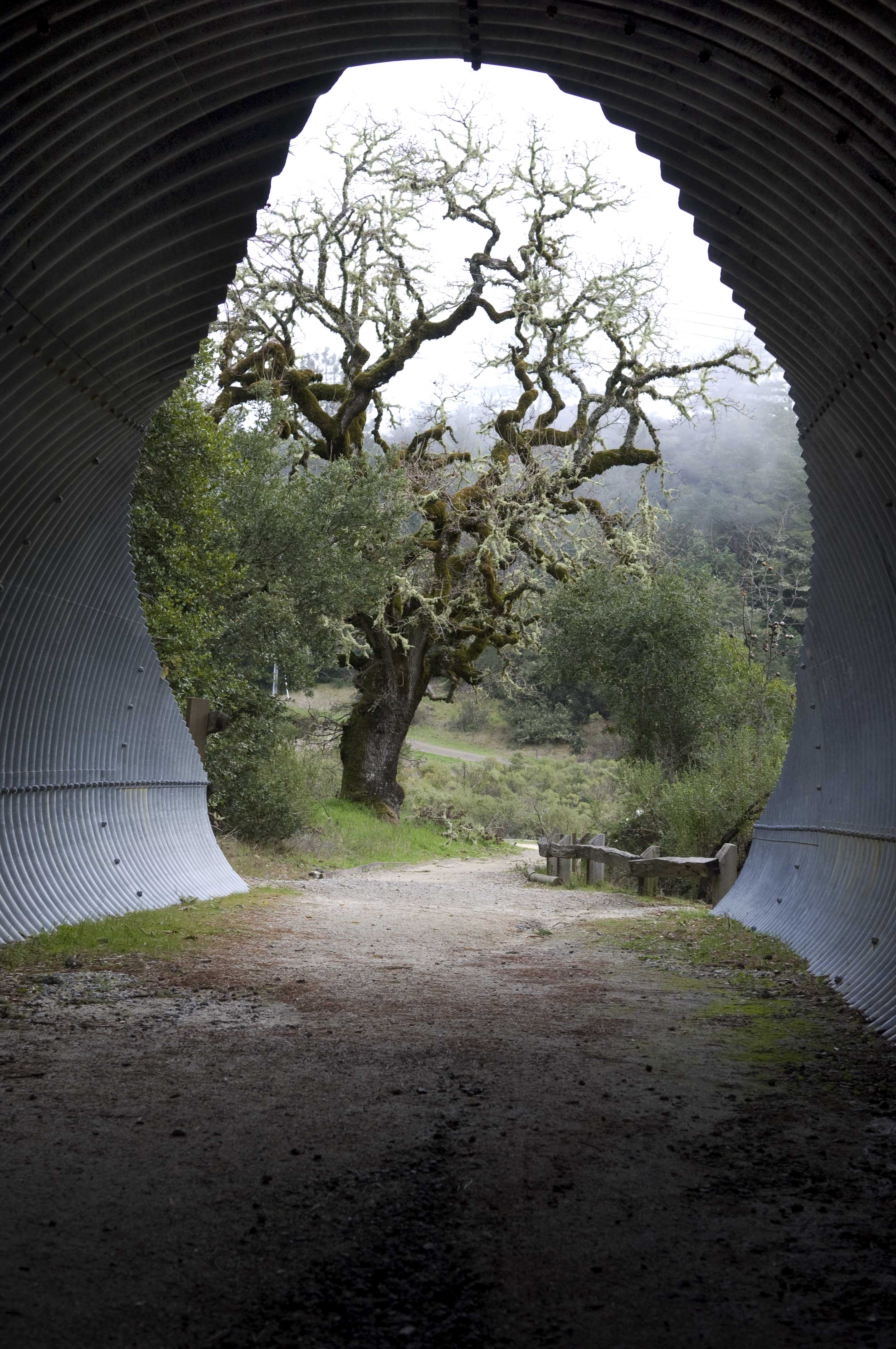 Tunnel to Alpine Lake